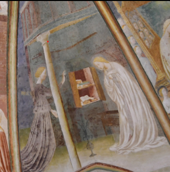 l'Angelo entra in casa di Maria per il Sacro Annuncio